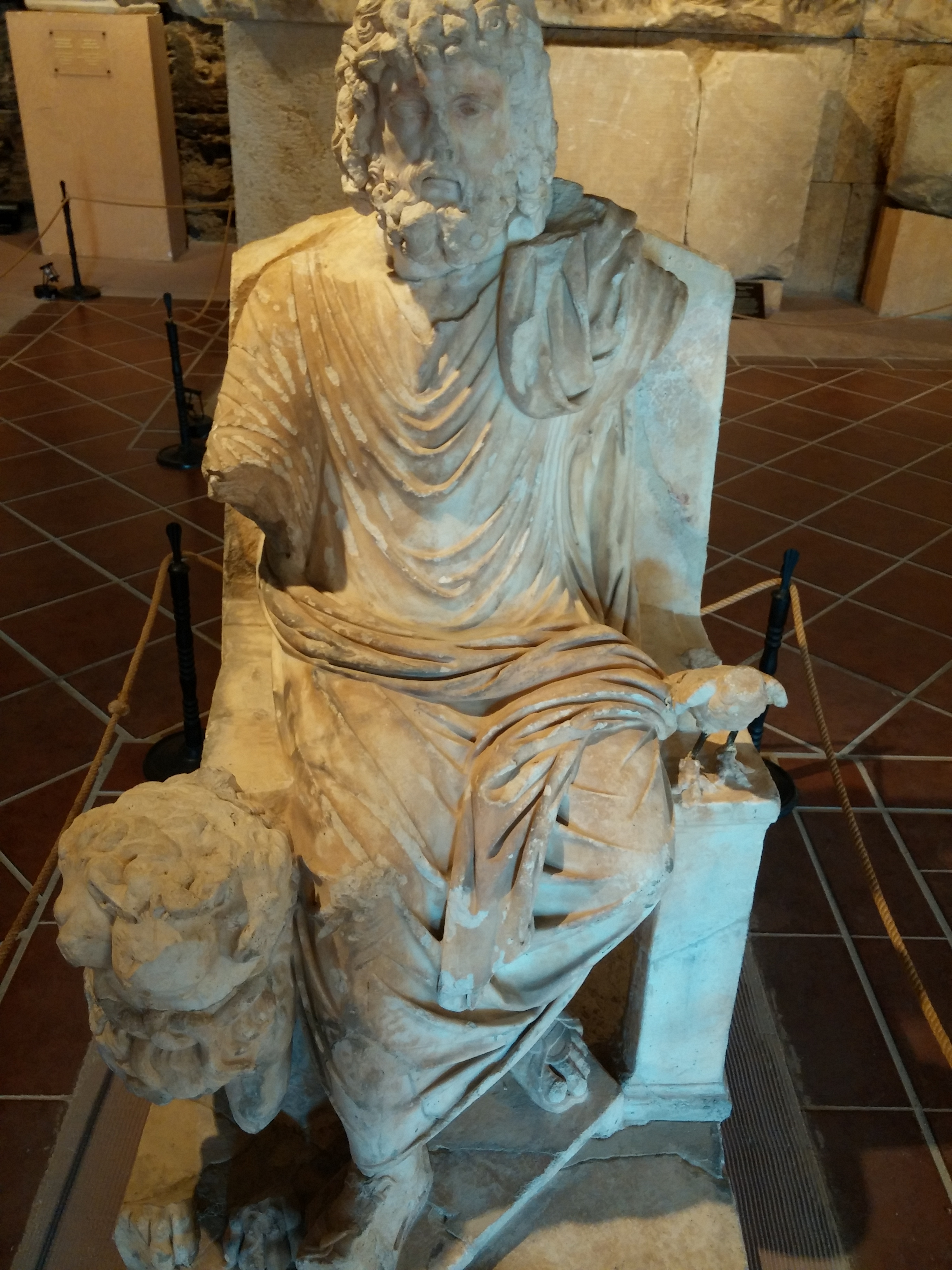 Hierapolis Müzesinde sergilenen ve 2. yüzyıl sonuna tarihlenen Hades heykeli.